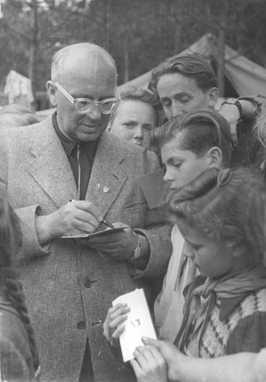 ADN-ZB Donath-Sei-Schm-III.Weltfestspiele der Jugend und Studenten in Berlin 1951 UBz: Johannes R.Becher im Gespräch mit Jungen Pionieren im Zeltlager der Pionierrepublik "Ernst Thälmann" in der Wuhlheide.4.8.1951